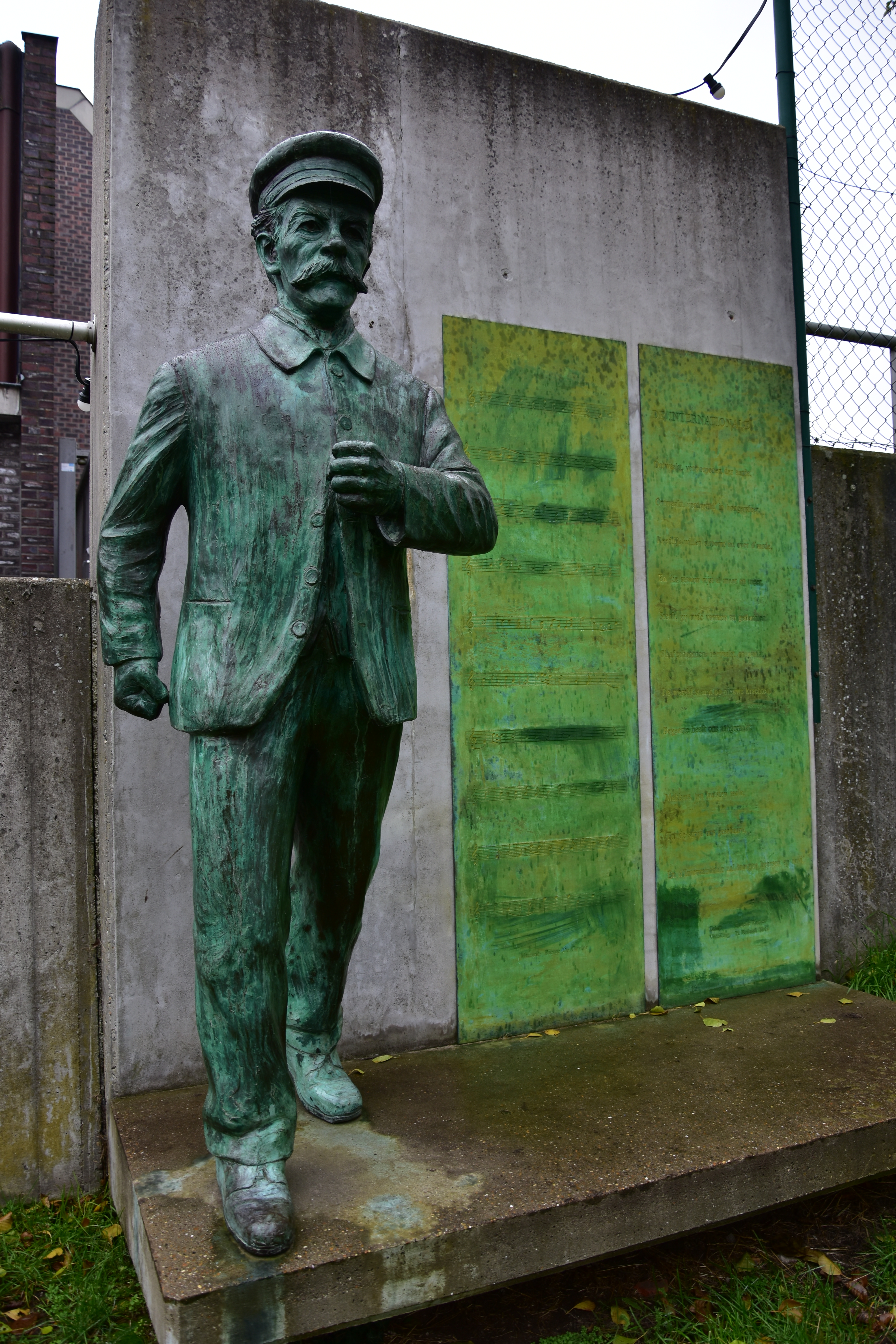 Tom Frantzen (1954) Pierre De Geyter (aan het Industriemuseum Gent) 18-11-2019 This photo of immovable heritage has been taken in the Flemish Region